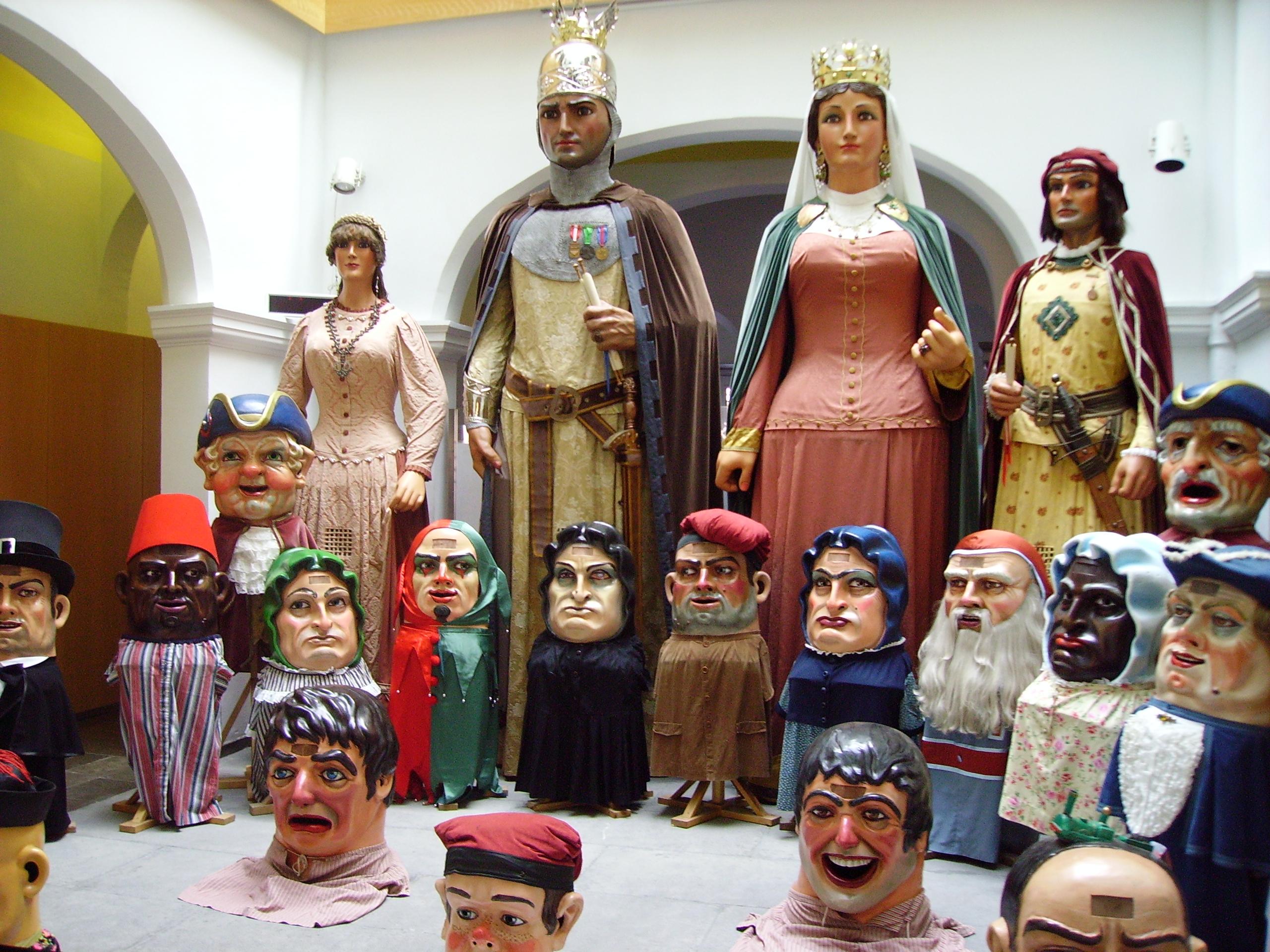 Gegants i Cap-grossos de Mataró